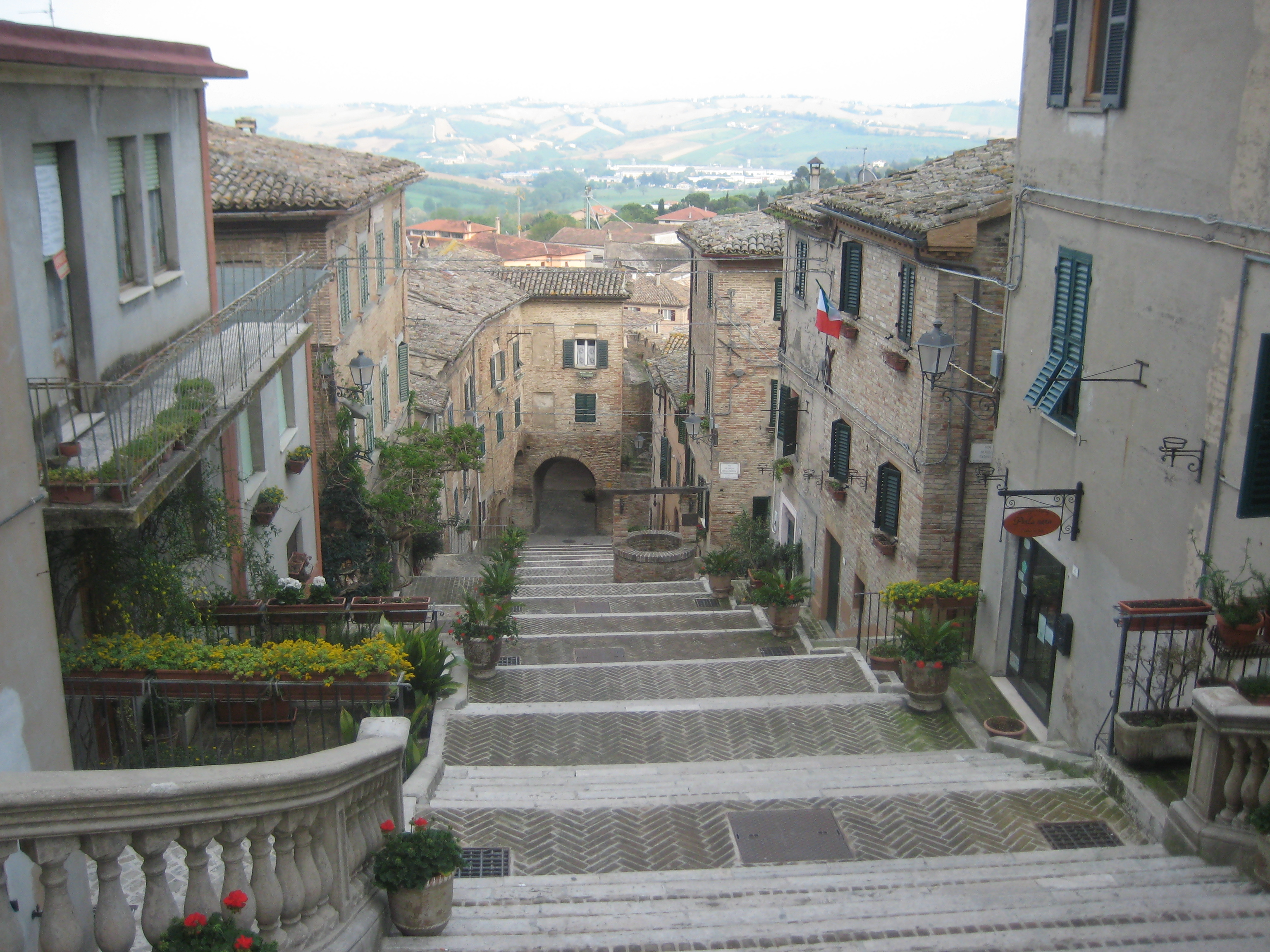 Le Cento Scale